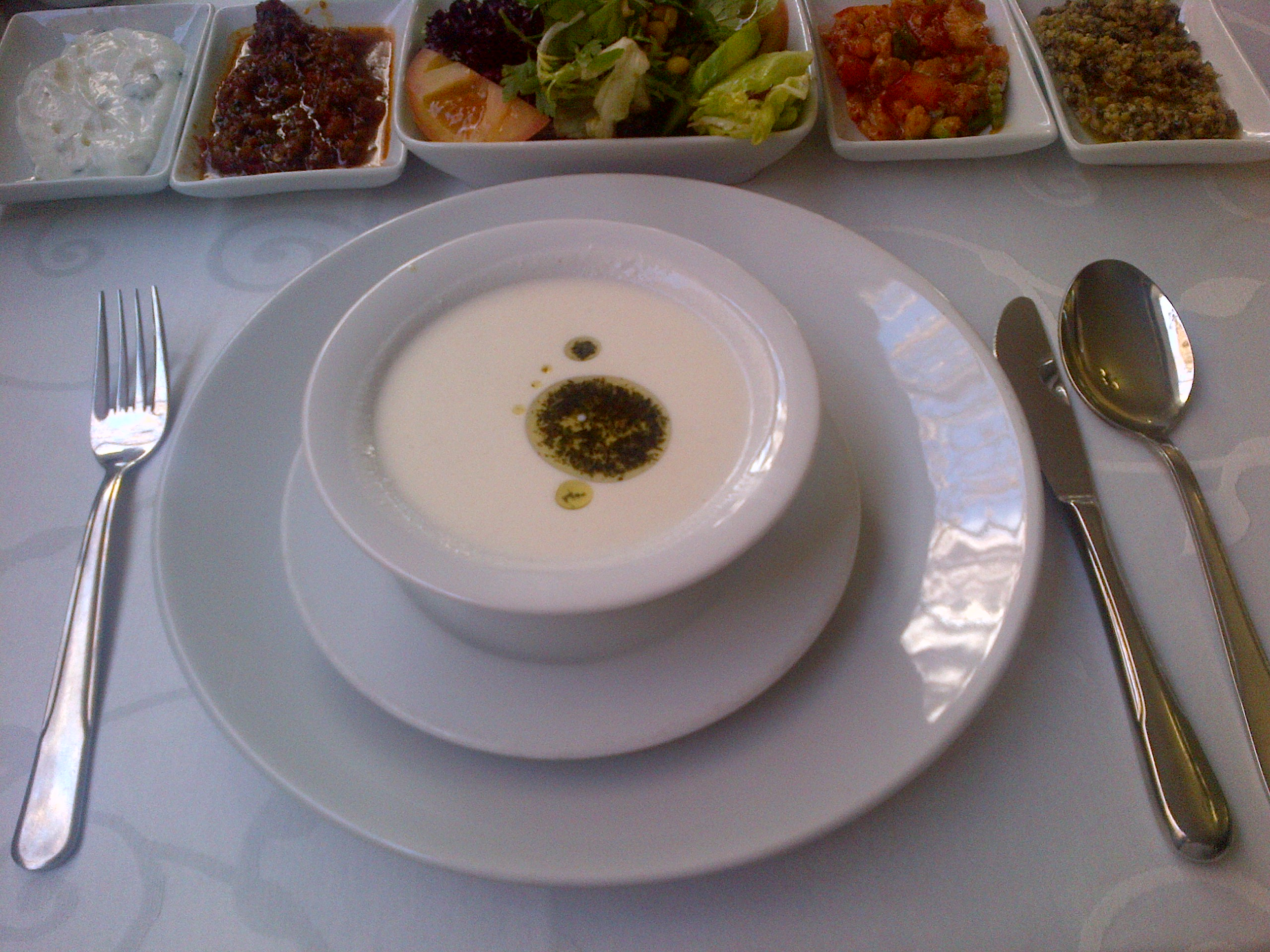 "Yuvalama", sopa turca de masa, yogurt y garbanzos; con su salsa de menta encima y algunos platitos de "meze" al lado.